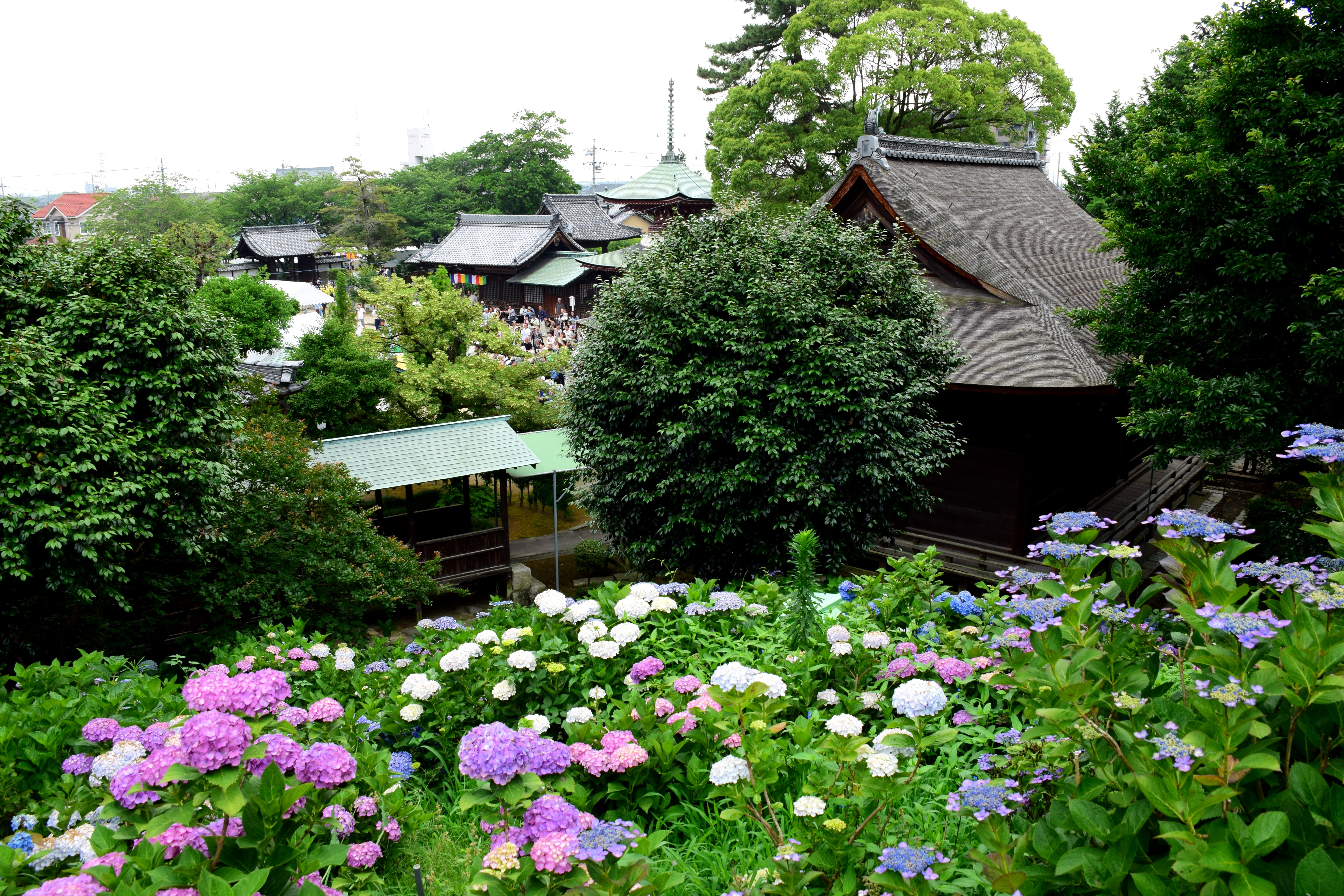 稲沢あじさいまつり（性海寺） Nikon D5300